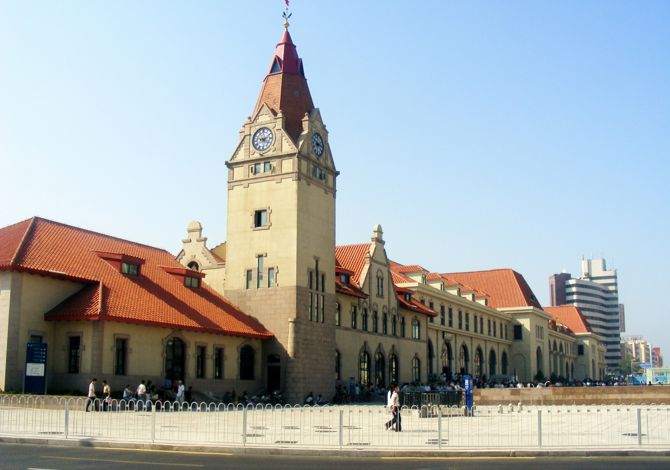 青岛站钟楼